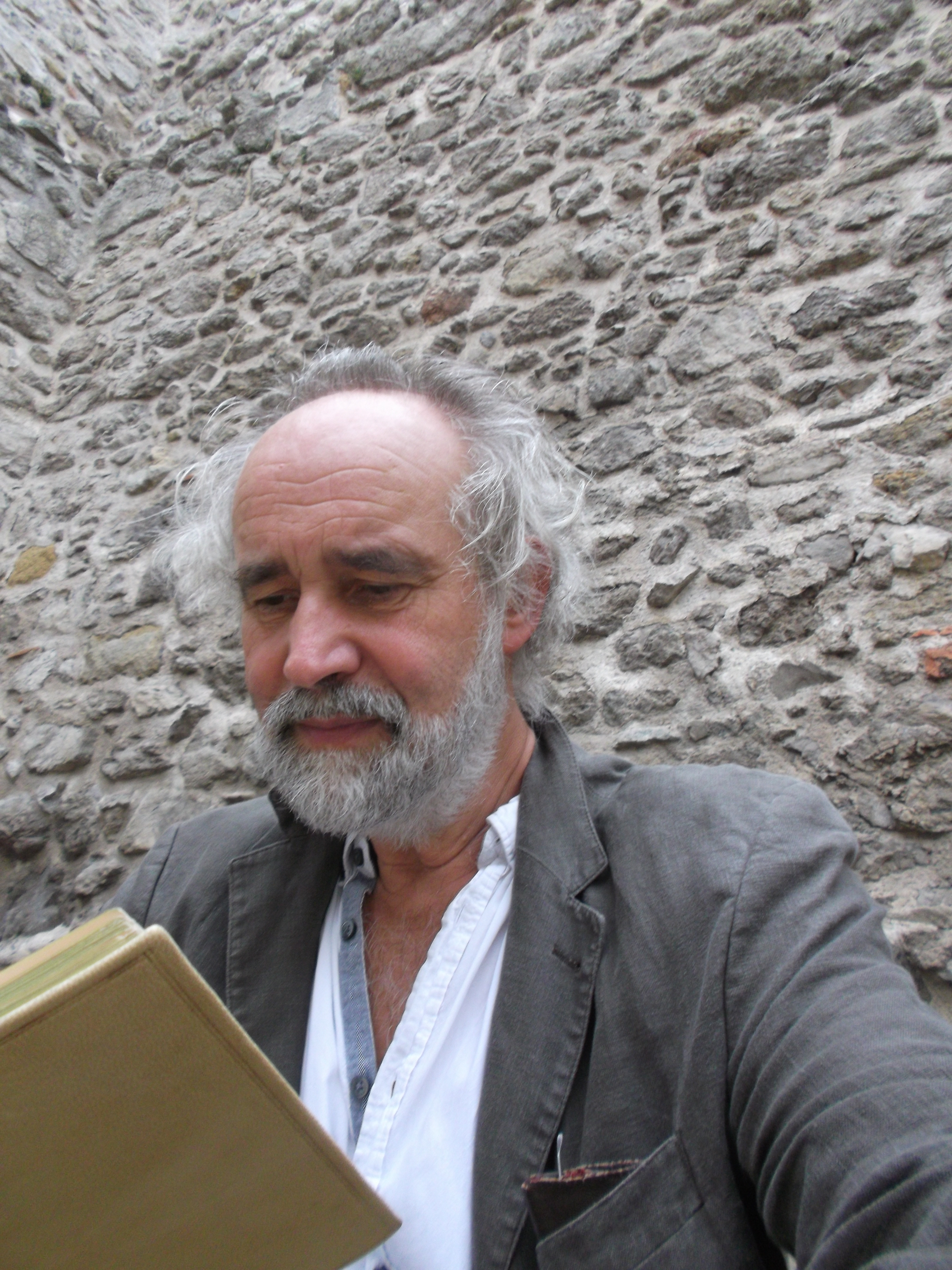 © Dr.phil. W. Berger (Mödling 10.2017)